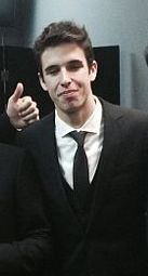 Alex Marquez 2014